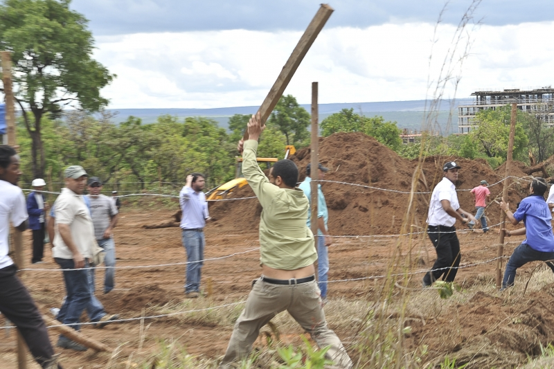 Brasilia - Manifestantes voltaram a entrar em conflito com seguranças de duas construtoras num terreno sediado no Setor Noroeste.O protesto deve-se ao fato de que as construtoras possuem alvará para realizar obras no local e os manifestantes alegam que a área pertence a uma comunidade indígena.